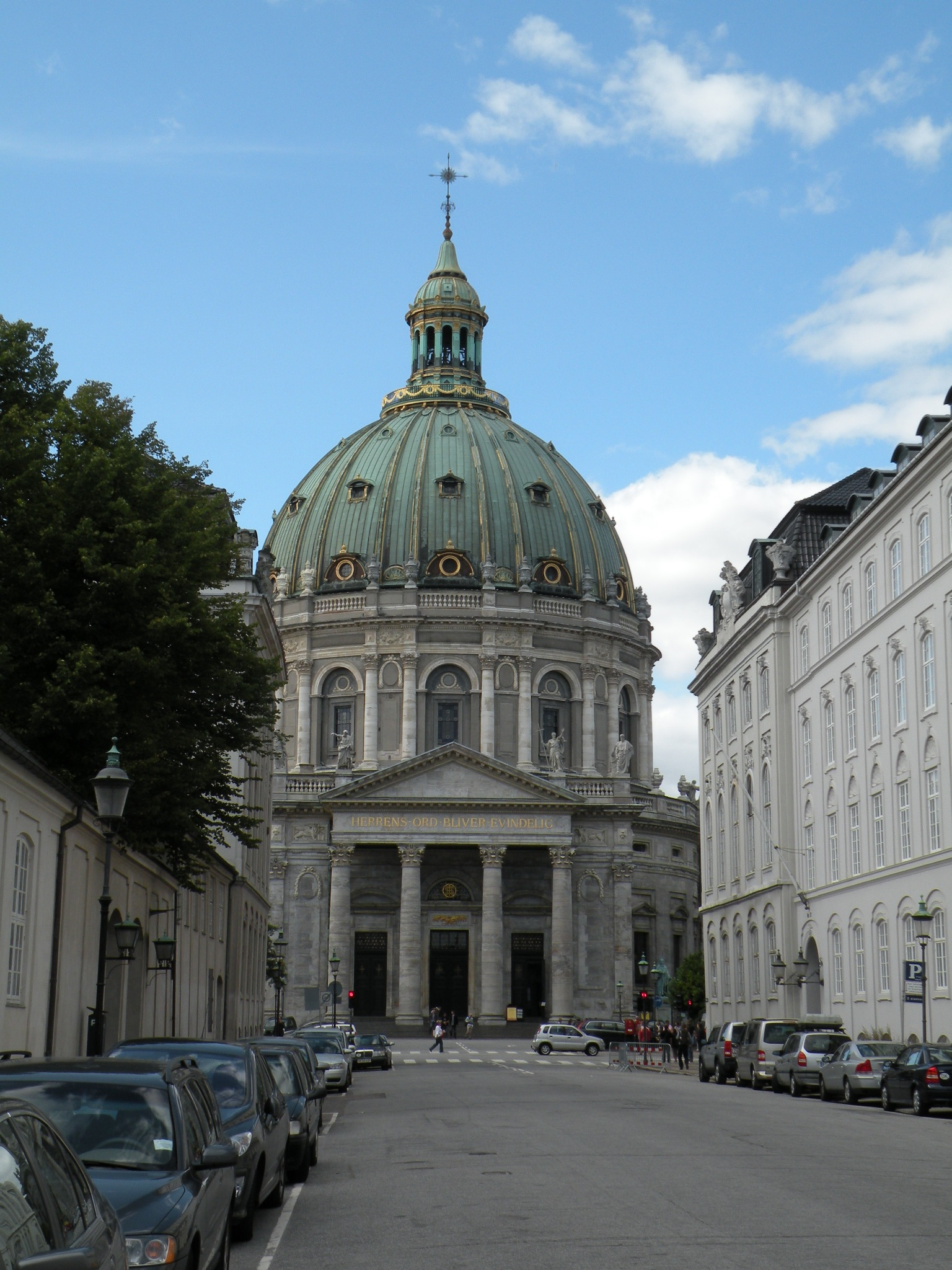 Marble church in Copenhagen, Denmark